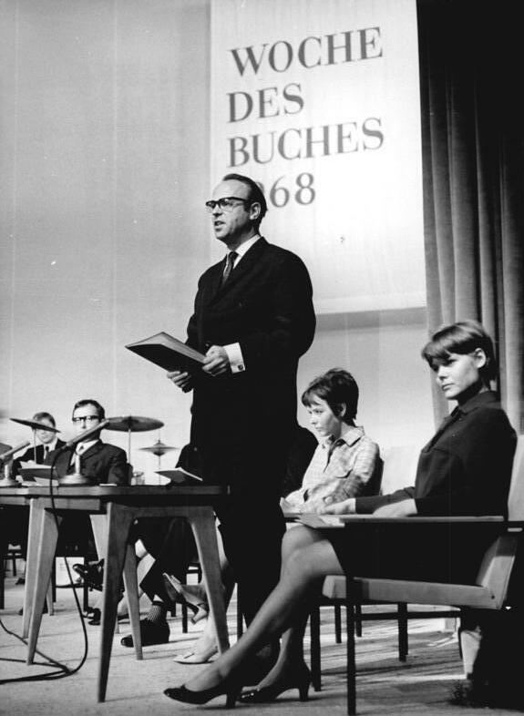 Zentralbild Katscherowski 27.10.68 Berlin: Zur Eröffnung der "Woche des Buches" Im Maxim-Gorki-Theater fand am 27. Oktober eine literarisch-musikalische Matinee "Denn das Gedicht ist immer jung" zur Eröffnung der "Woche des Buches 1968" 1968 statt. Unser Foto zeigt Christoph Engel bei seinem Vortrag. Rechts: Katja Paryla und Monika Lennartz (rechts vorn).